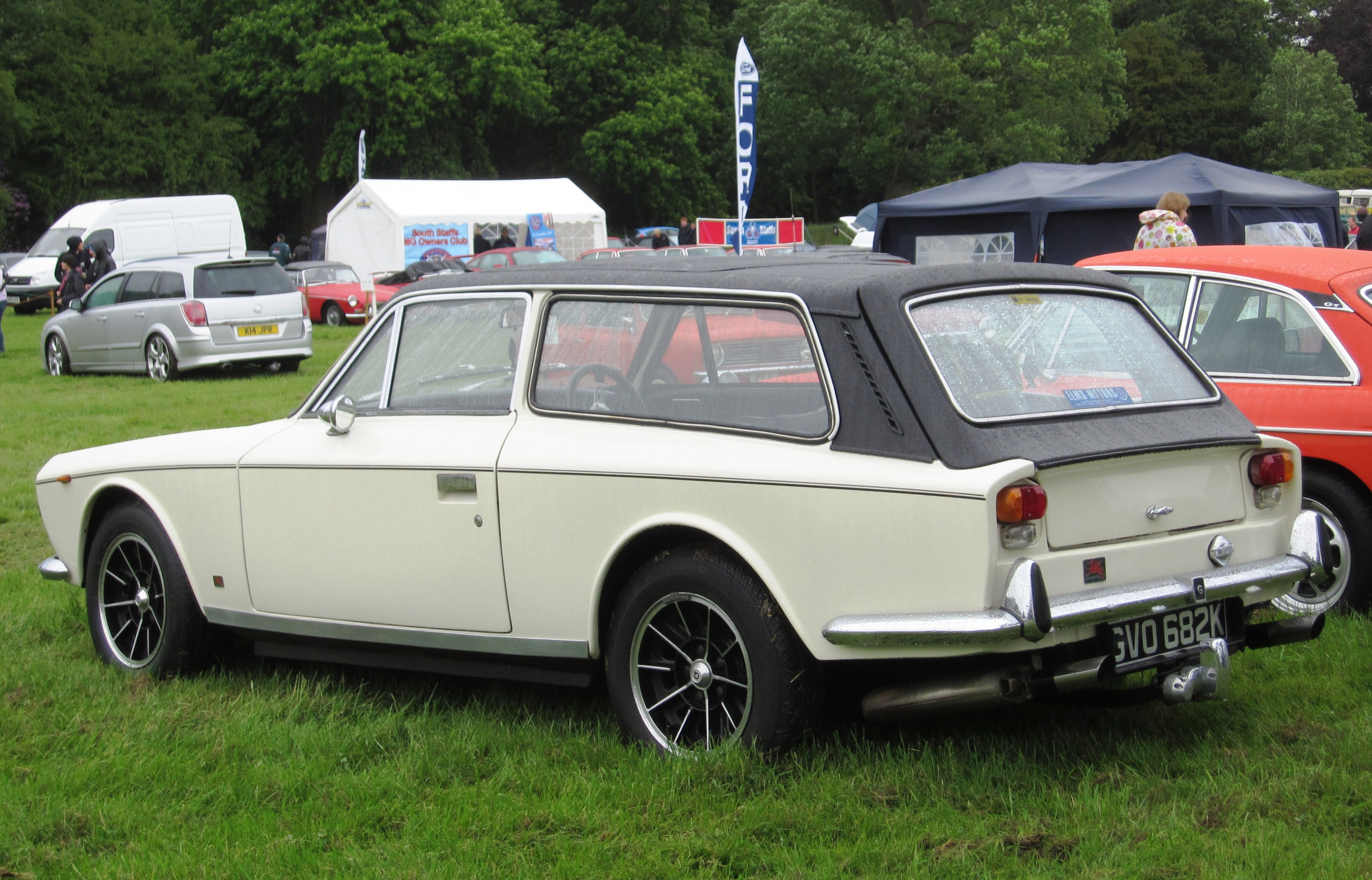 Gilbern Invader break (1971)